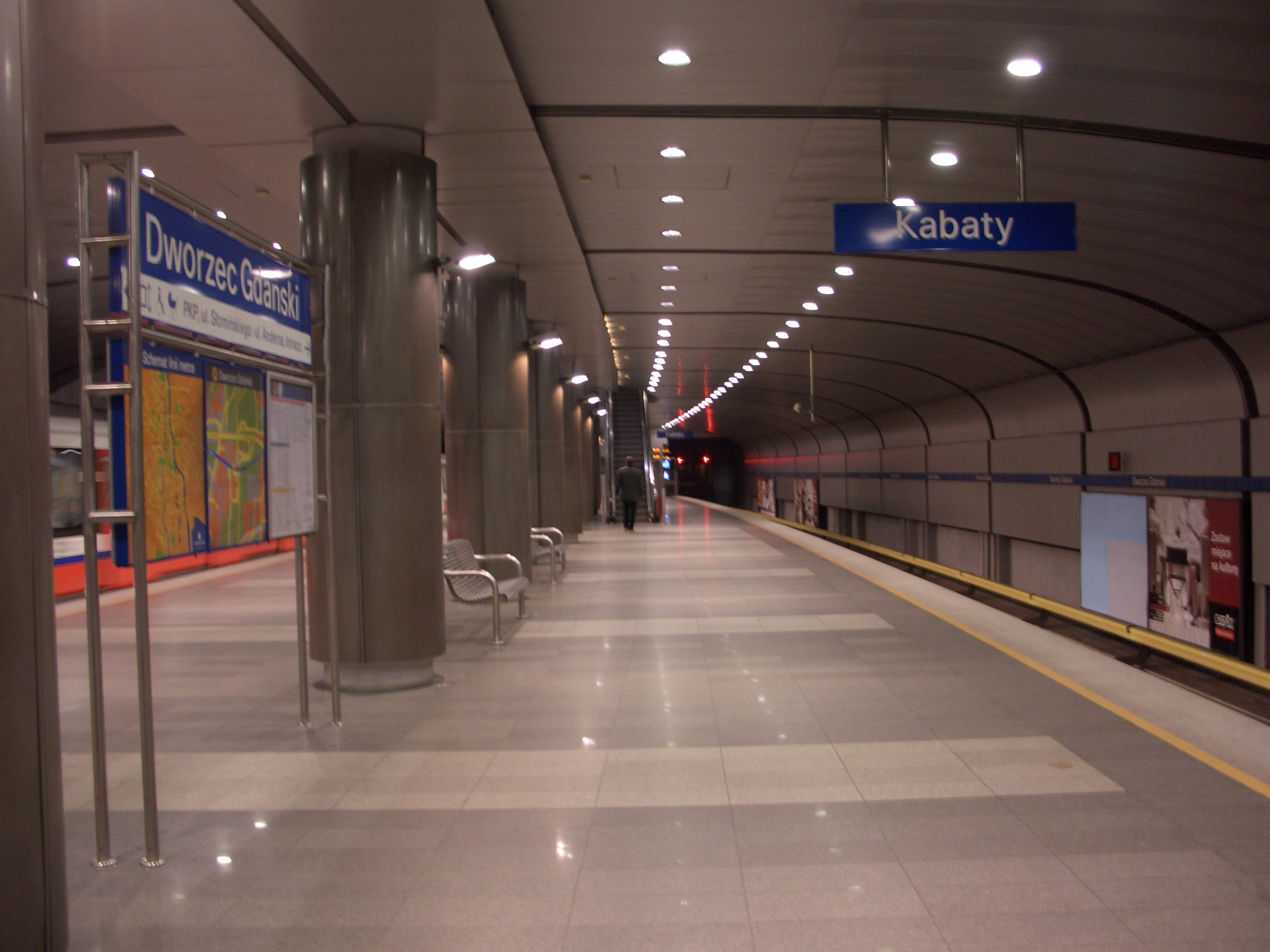 Stacja Dw. Gdański - Metro Warszawskie/Dworzec Gdanski Station - Warsaw Metro